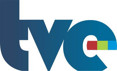 Nova Logo da TV Educativa de Alagoas, usada a partir de 2013...